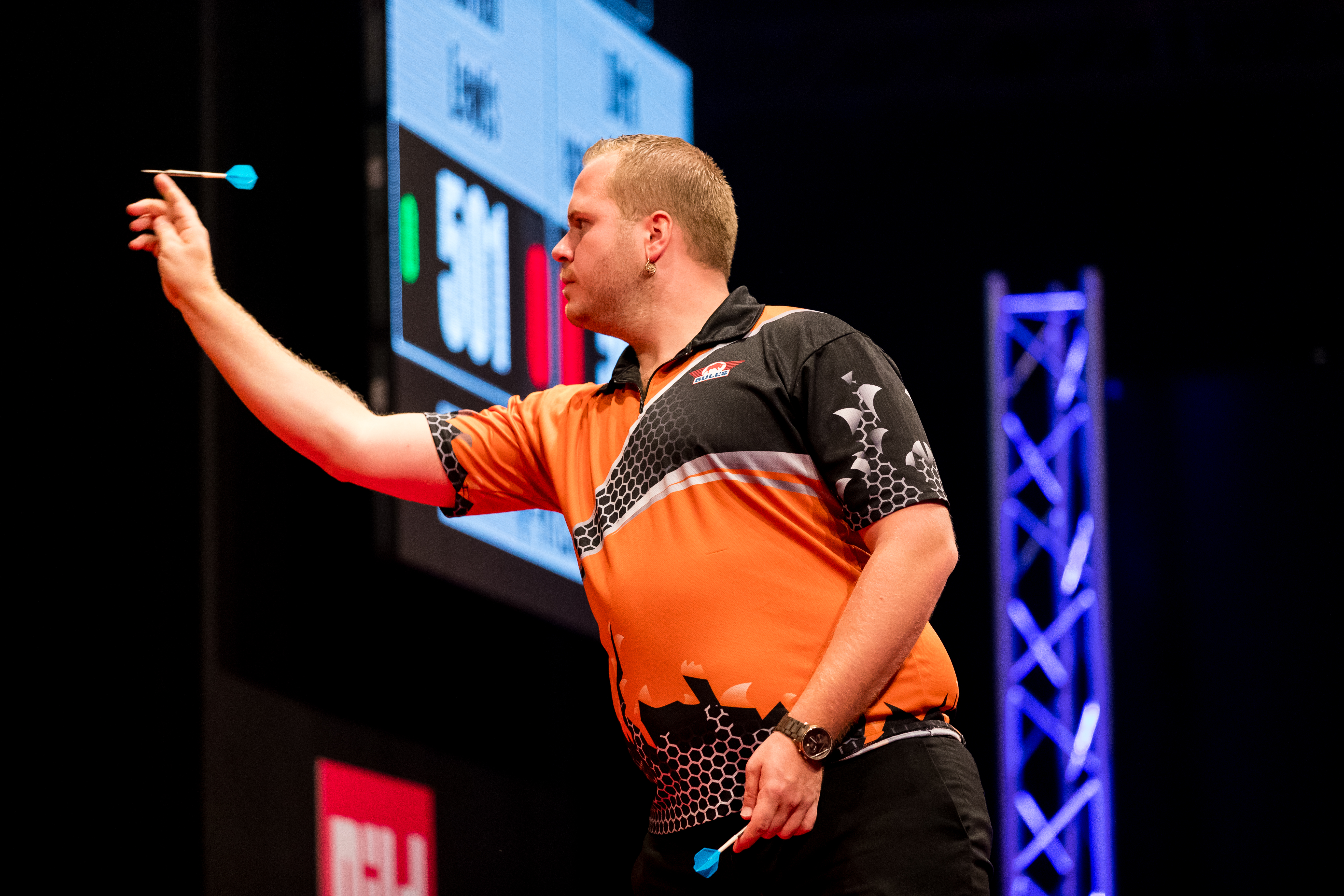 Adrian Lewis 6:2 Dirk van Duijvenbode during PDC Europe Darts Matchplay at Maimarkthalle, Mannheim, Baden-Württemberg, Germany on 2019-09-07, Photo: Sven Mandel